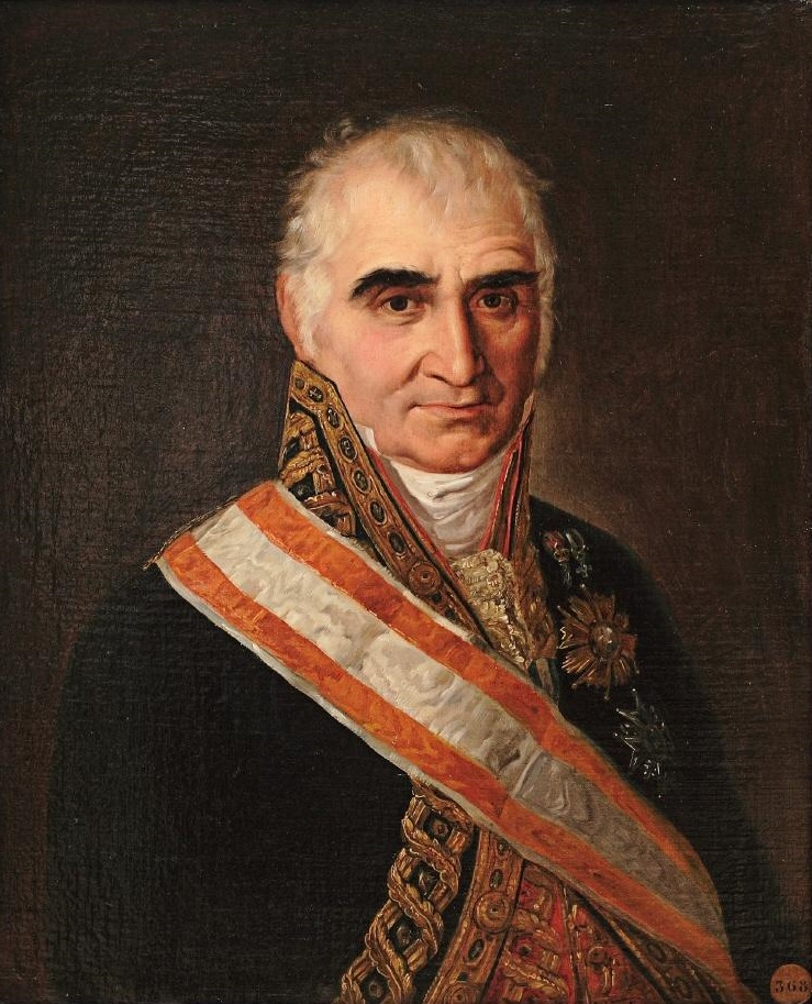 Retrato del político y economista español José Canga Argüelles (1770-1843), que fue Superintendente general de Hacienda en 1811 y diputado de las Cortes de Cádiz en el mismo año. El 14 de enero de 1811 y el 6 de febrero de 1812 fue nombrado ministro de Hacienda con carácter interino, y elaboró el primer Presupuesto español de gastos e ingresos del Estado. Desterrado por la monarquía absolutista volvió a ser ministro de Hacienda durante el Trienio liberal entre el 22 de marzo de 1820 y el 2 de marzo de 1821, y en 1820 también fue consejero de Estado.